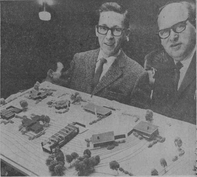 Utställningskommissarie Carl-Ivar Ringmar och direktör Karl Anebäck med modell av "Nordisk villaparad" vid Norrköpings Expon "Nu 64".